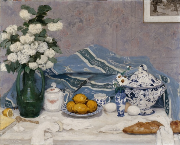 nature morte représentant une table sur laquelle sont posés des citrons, une soupière, un vase de fleurs, dominante bleu et blanc, rehaussé d'une touche jaune